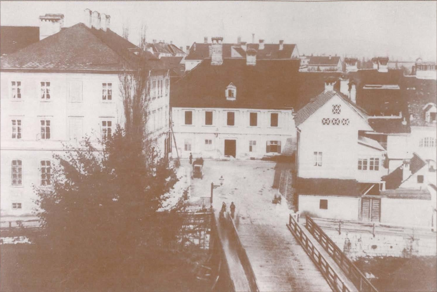 Mesarski most in Resljev trg